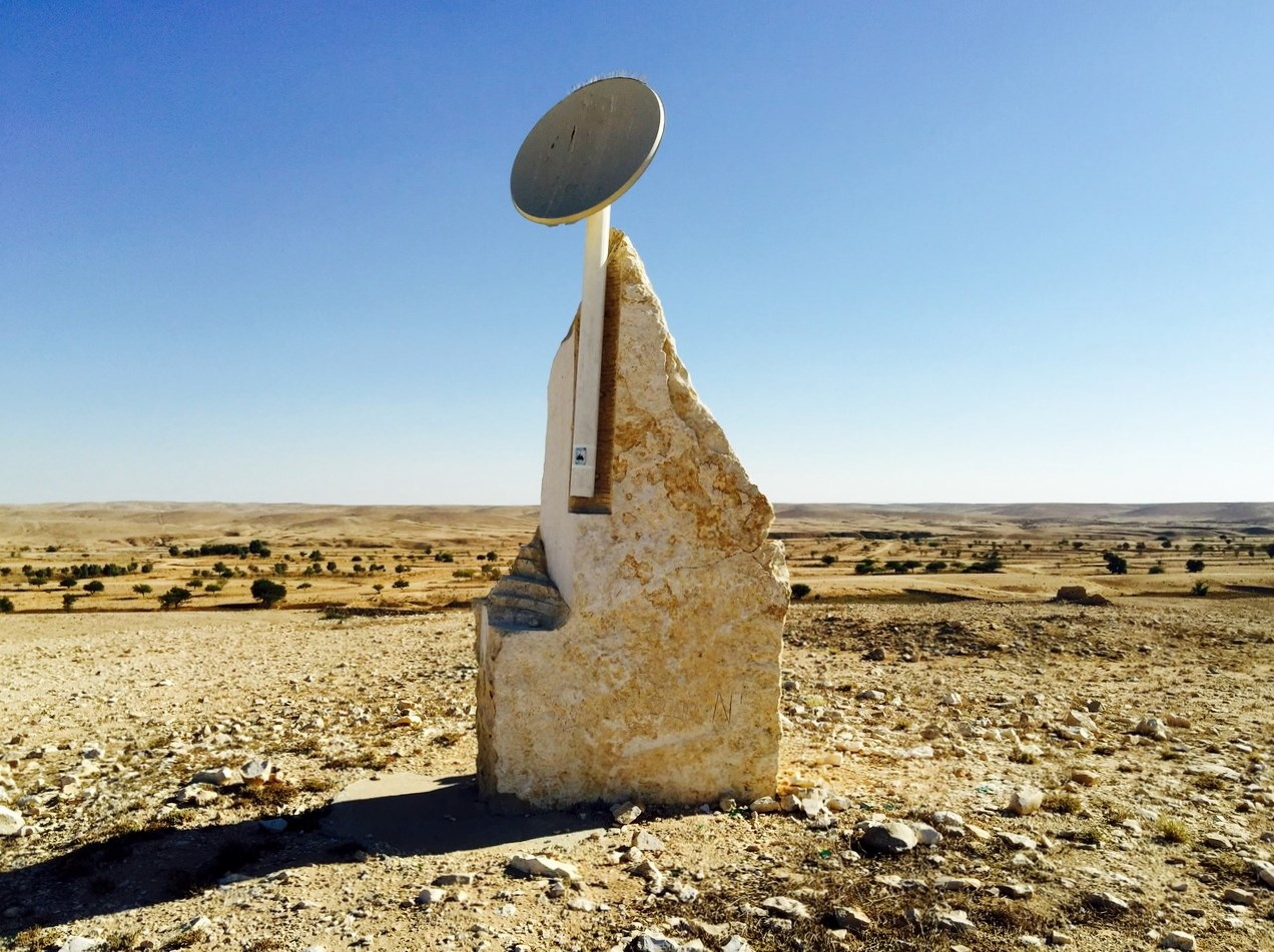 חמישה מטר על שני מטר חומר: אבן גיורית משקל: 5 טון מיקום: קיבוץ חצרים